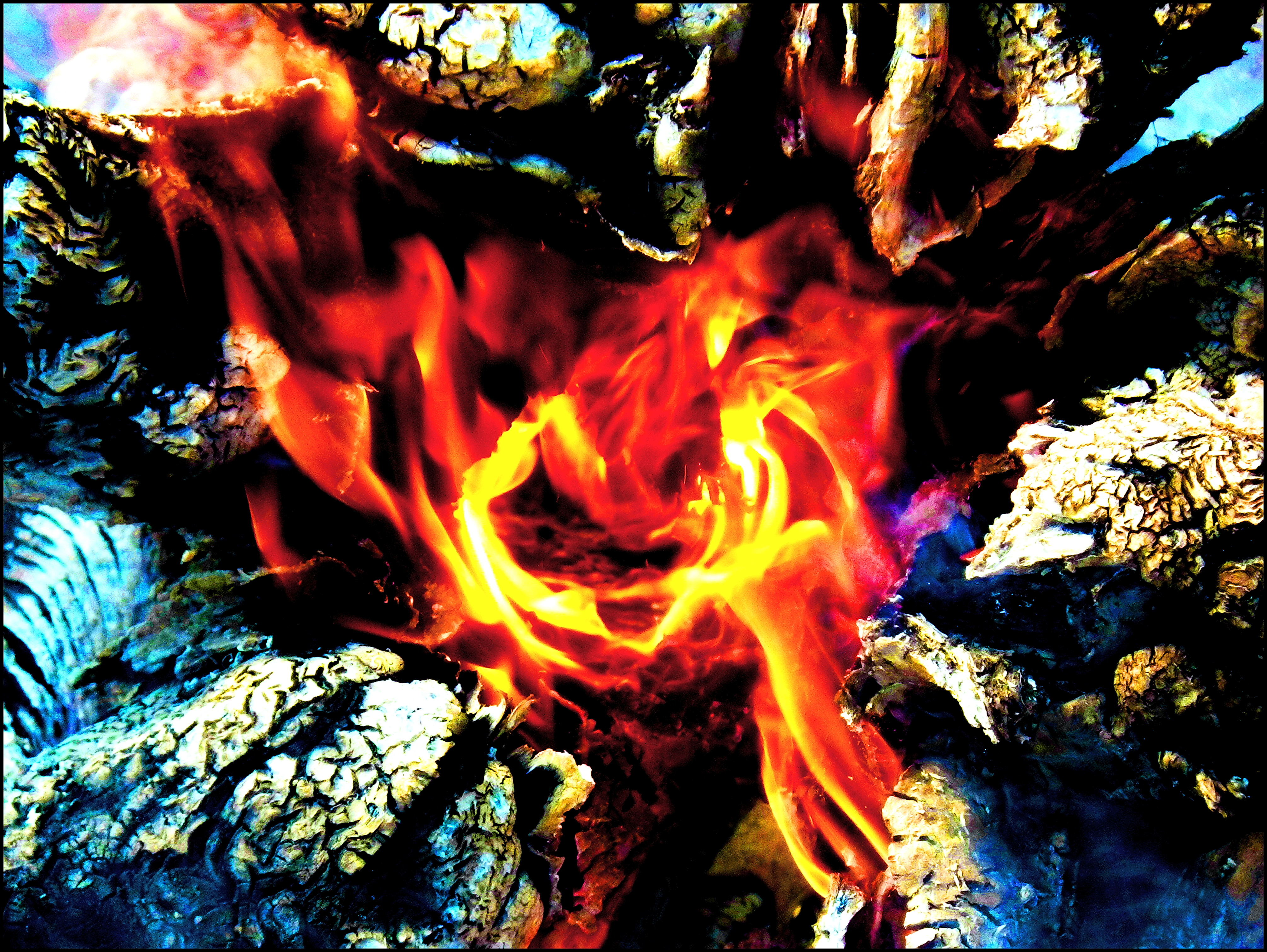 Последний костёр на берегу Телецкого озера